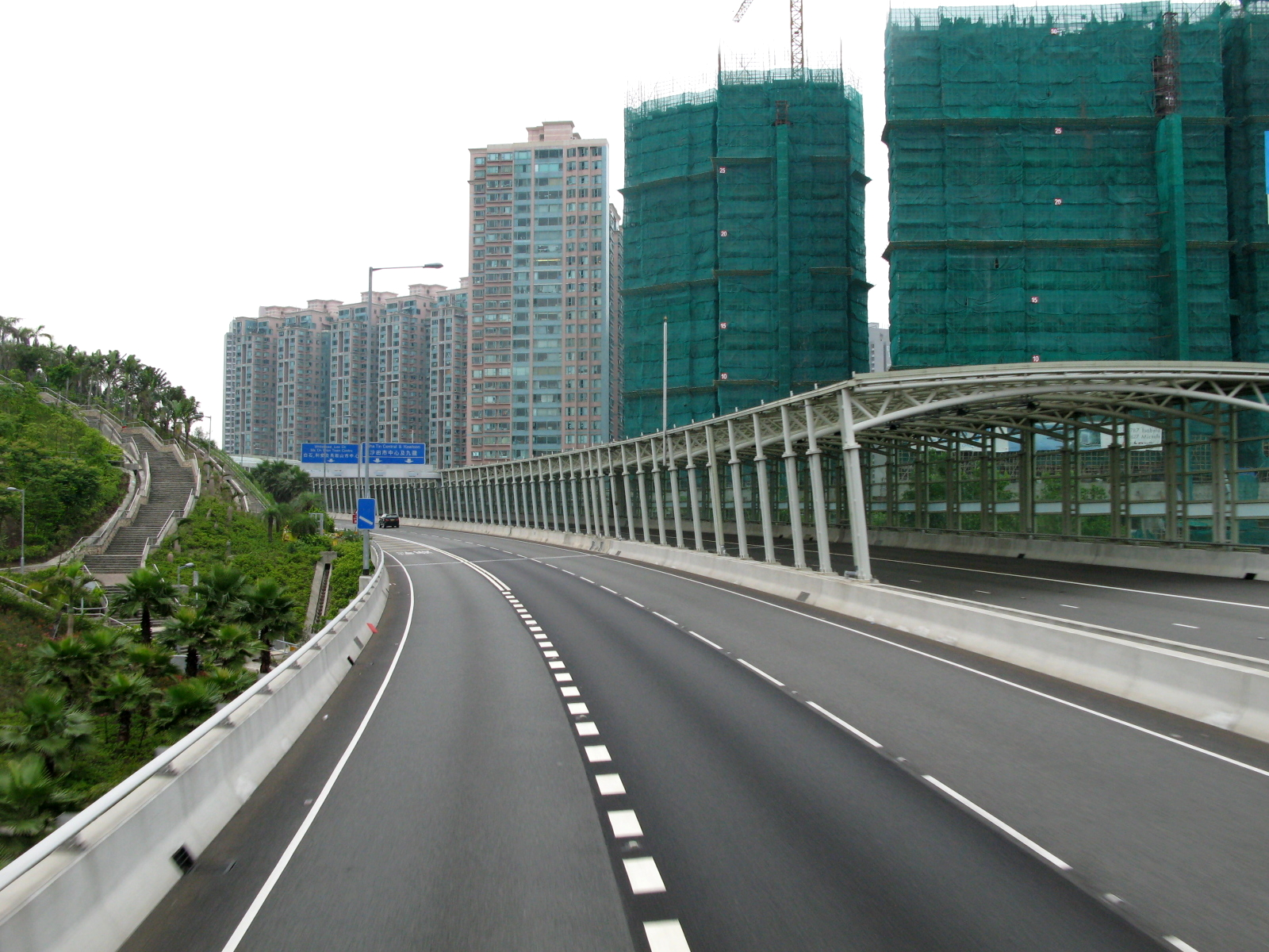 馬鞍山繞道樟木頭出口 HK Ma On Shan Bypass Cheung Muk Tau